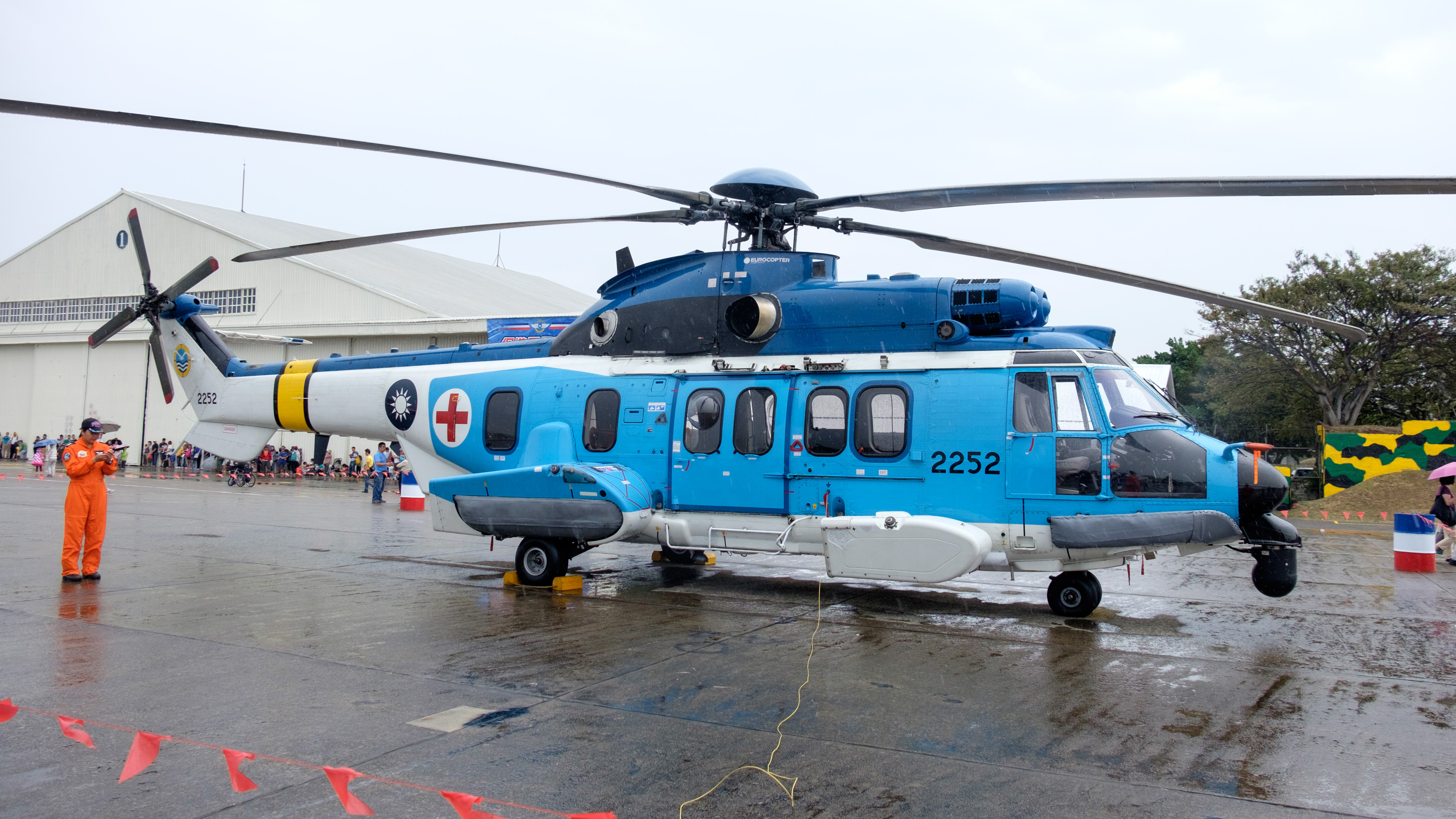 2015年空軍新竹基地營區開放活動，停機坪展示的空軍救護隊EC 225 2252救難直昇機右前方。